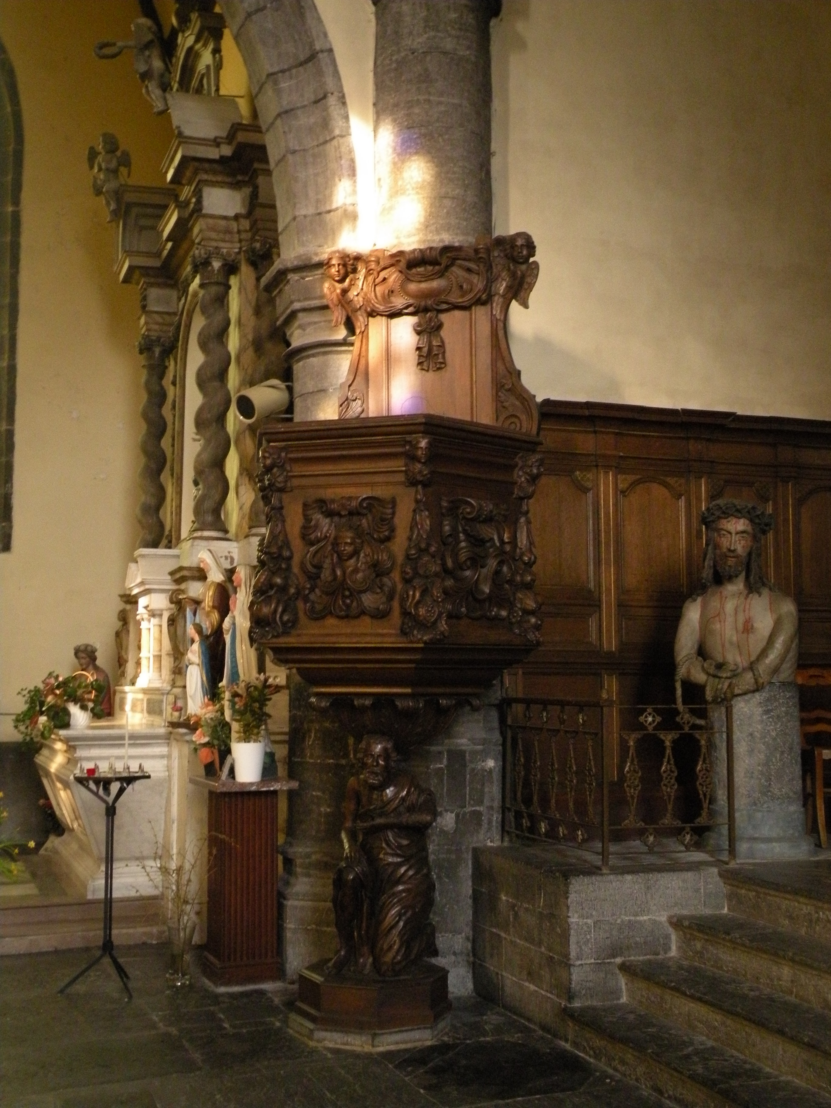 Église Saint-Martin de Cousolre